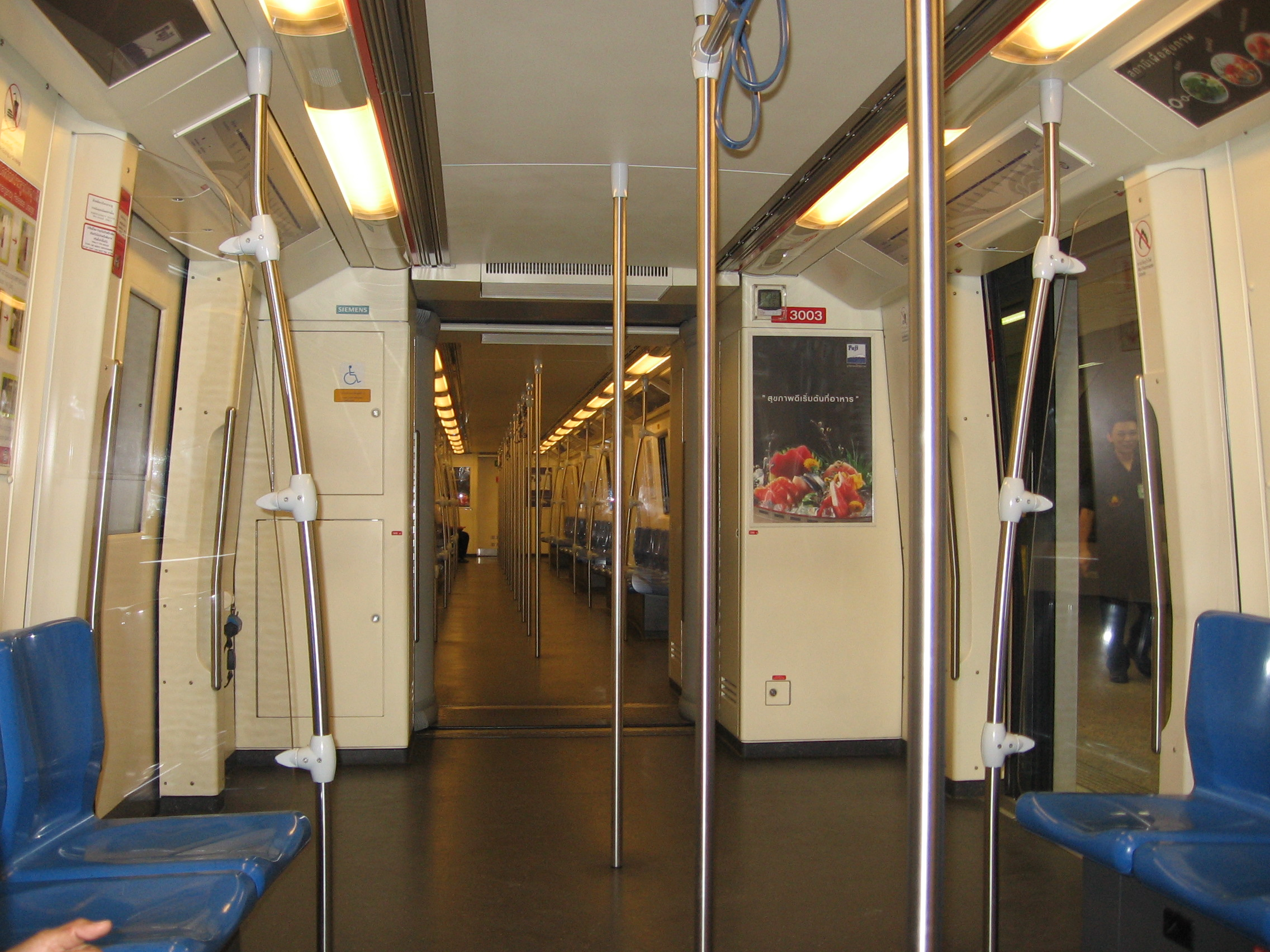 Interior of Bangkok MRT